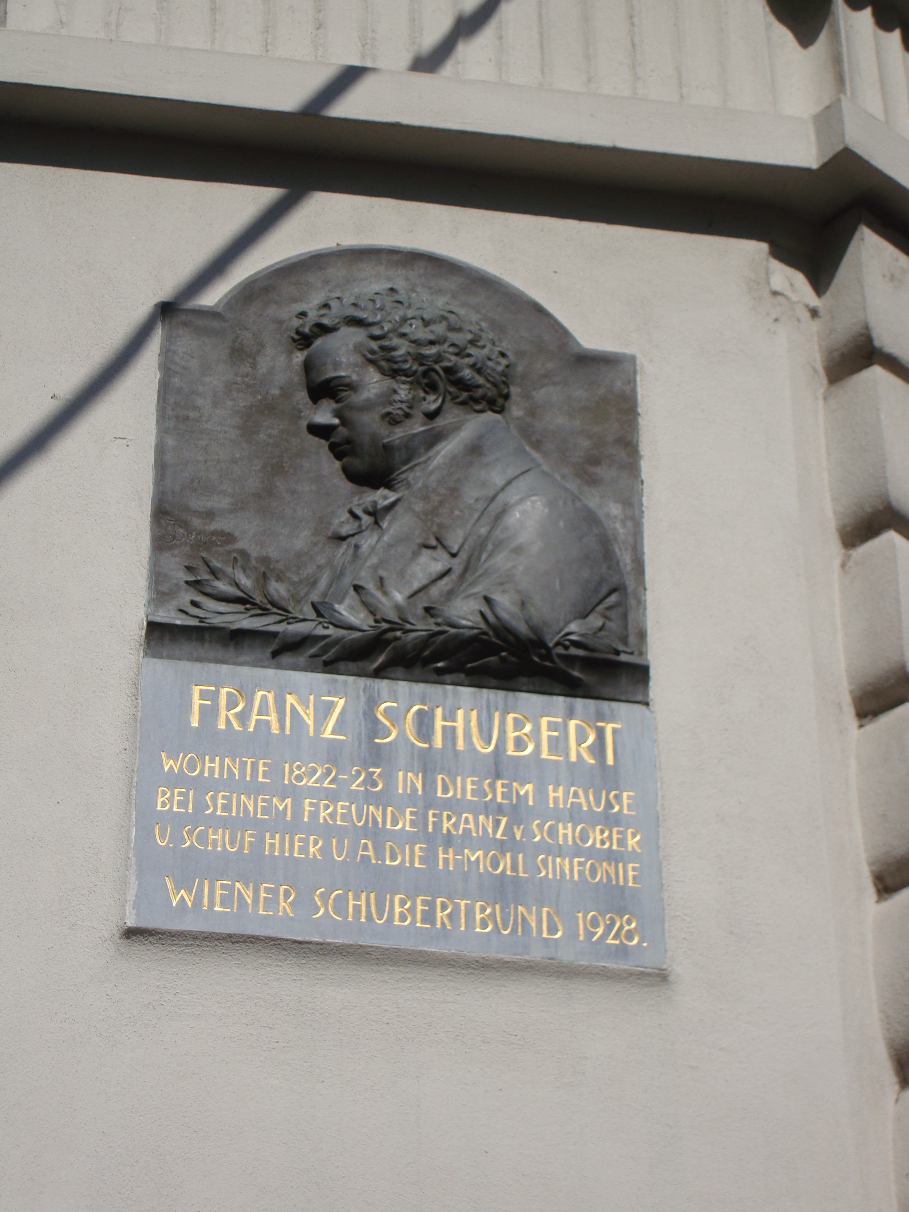 Göttweiger Hof Spiegelgasse1